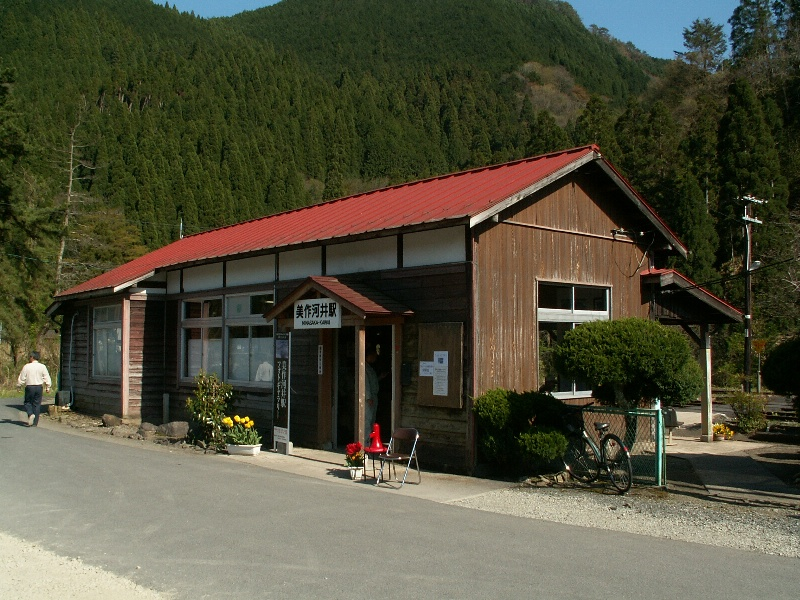 JR西日本 因美線 美作河井駅 2007.4.28 投稿者が撮影